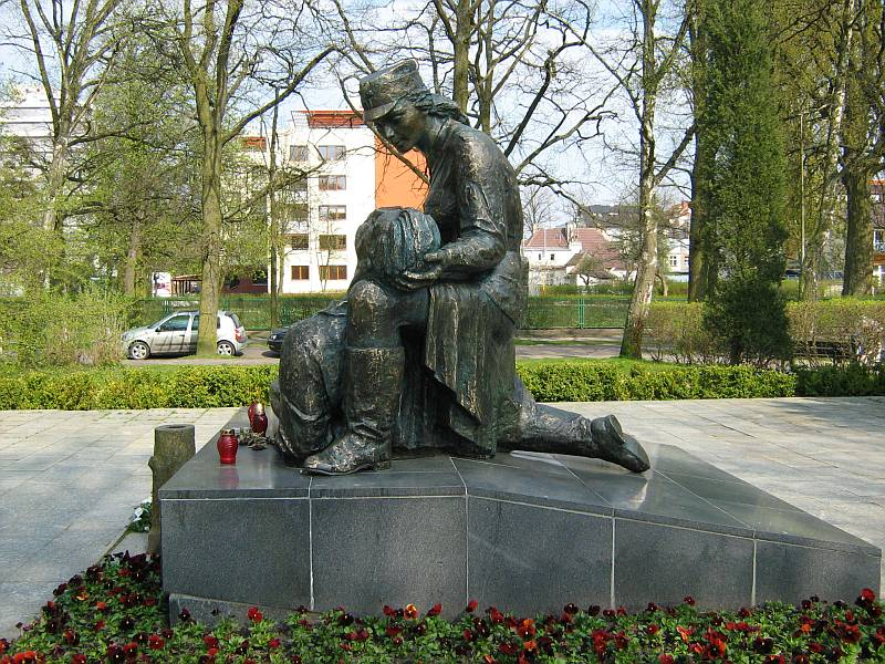 Pomnik Sanitariuszki w Kołobrzegu. Widok od strony zachodniej.